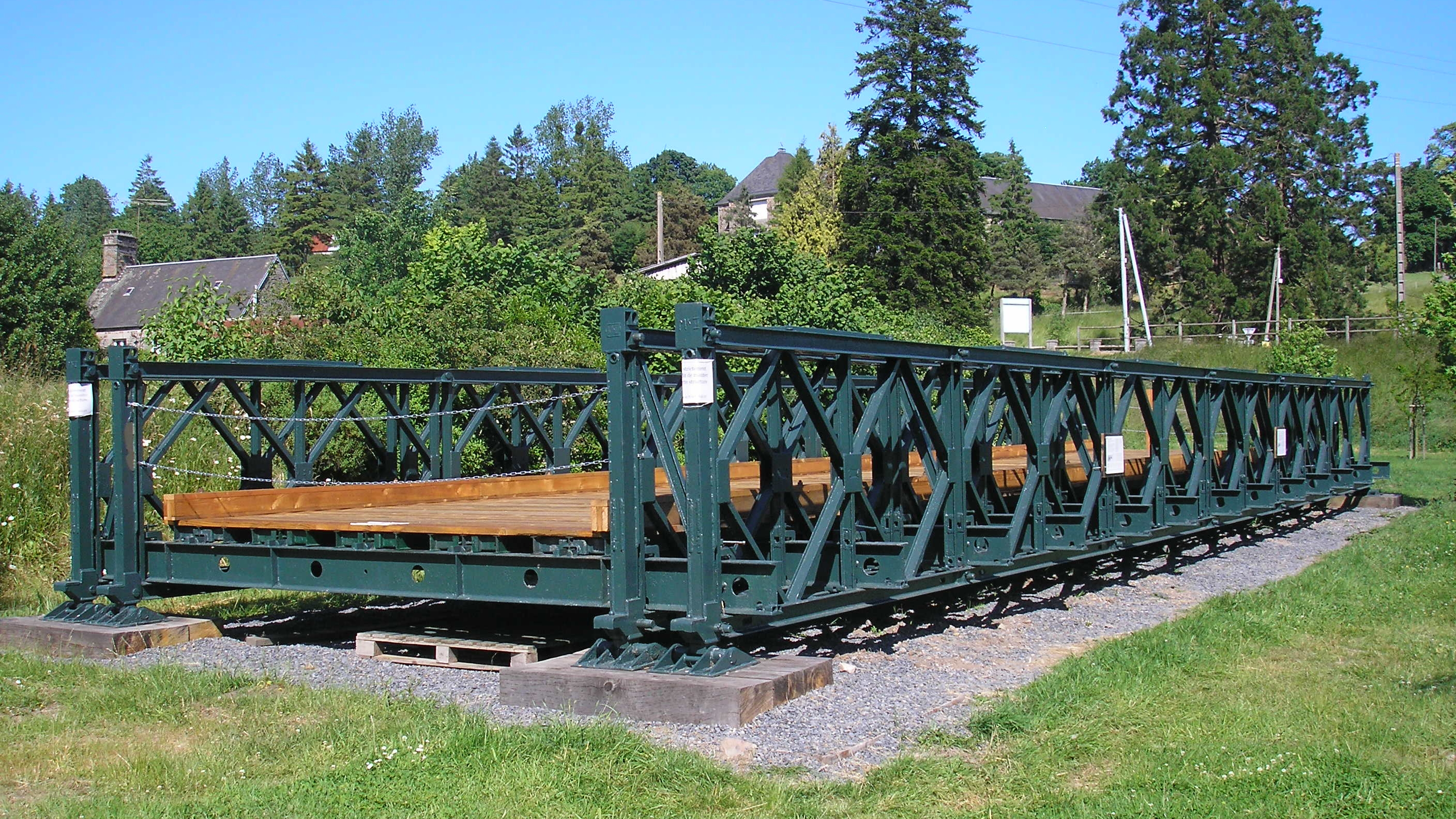 Pont-Farcy (Normandie, France), territoire de l'ancienne commune de Pleines-Œuvres. Le pont Bailey.